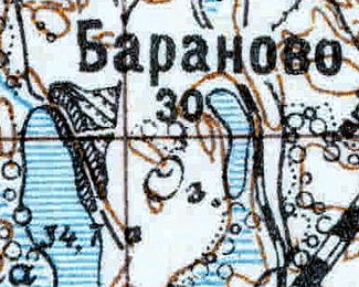 Топографическая карта Ленинградской области, квадрат VIc-28 (Луга), деревни Бараново, Дёргово, Вяжище